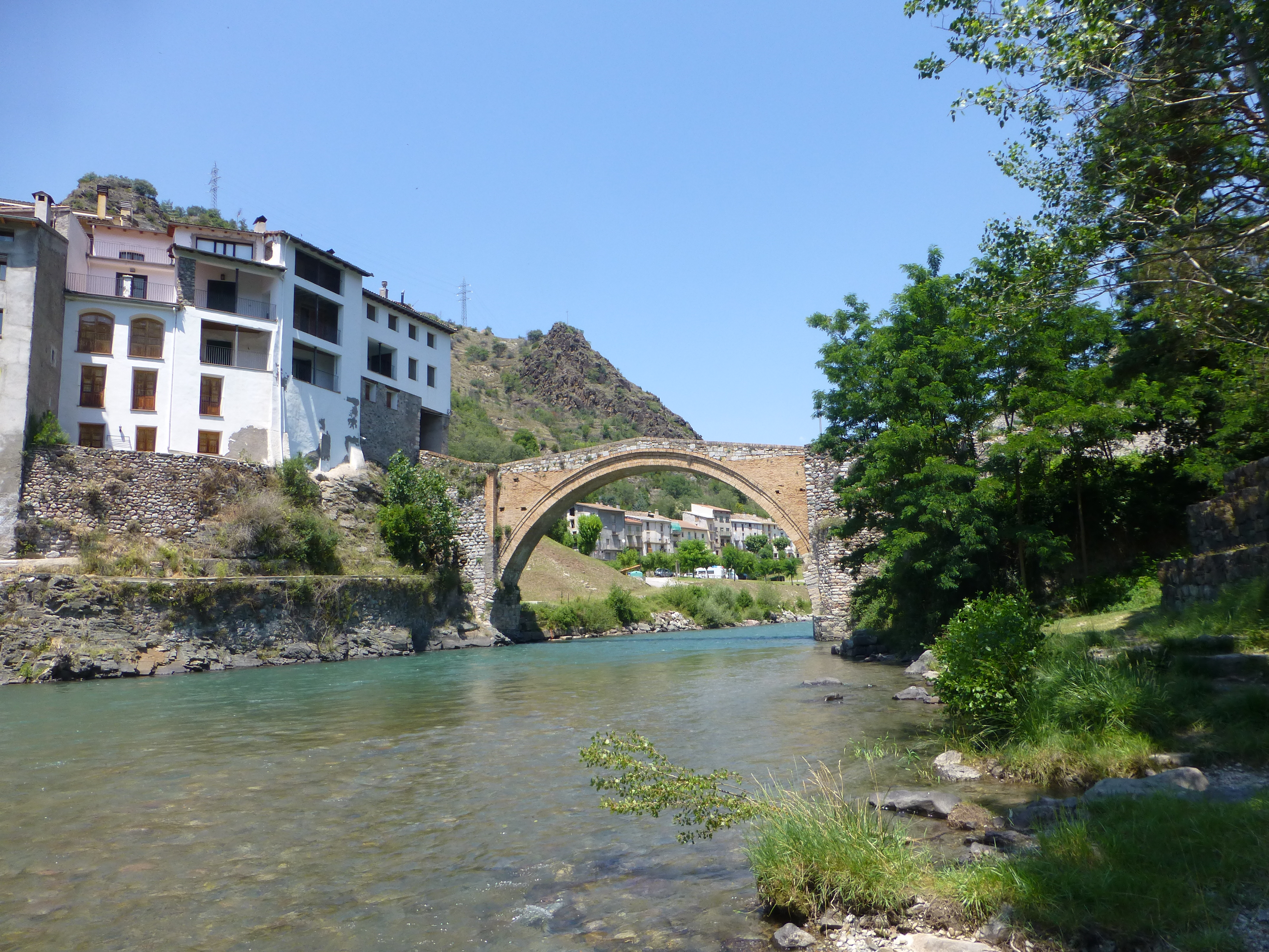 Puente de Gerri de la Sal. Cataluña, España.